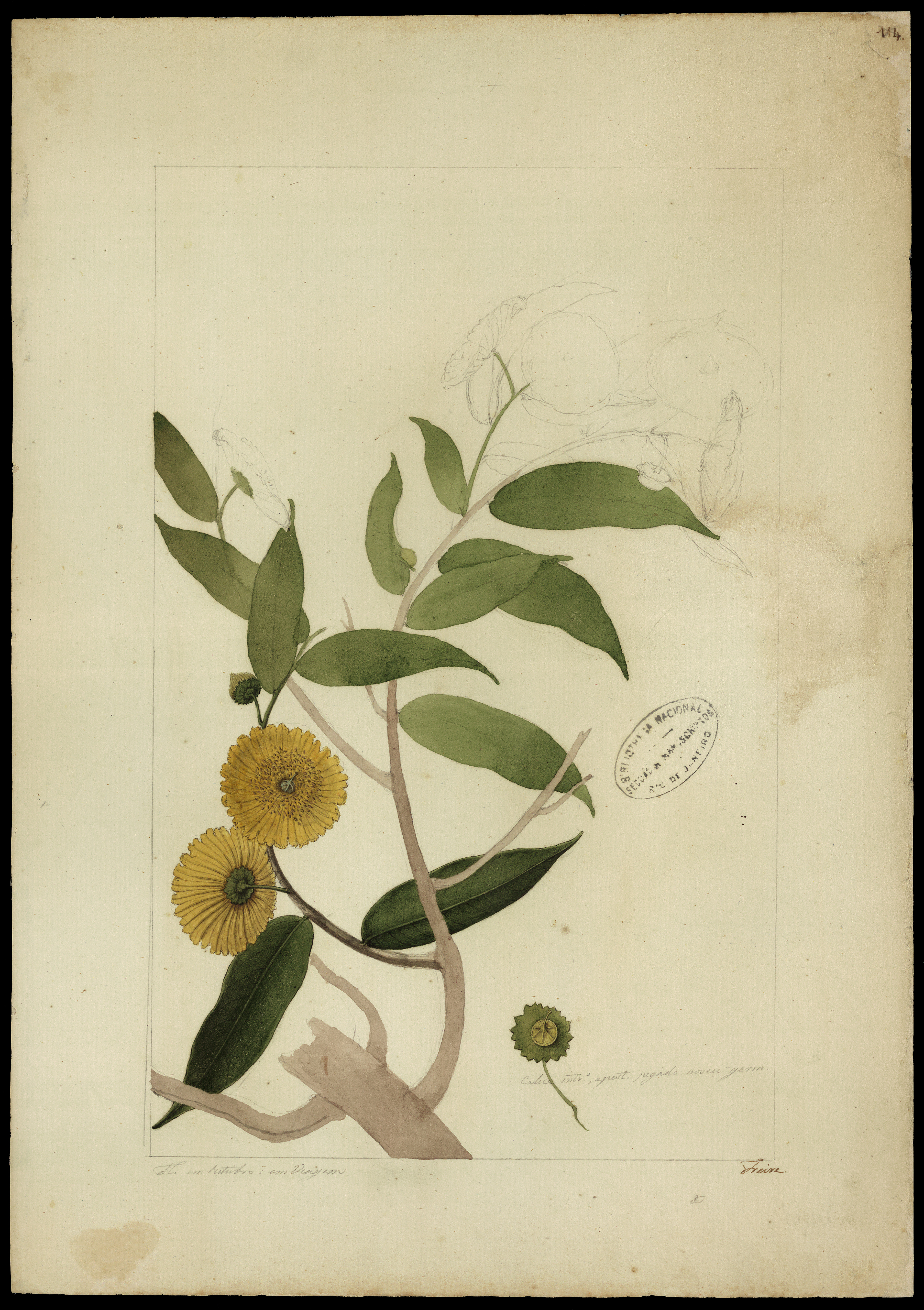 Obra da coleção Brasiliana Iconográfica.